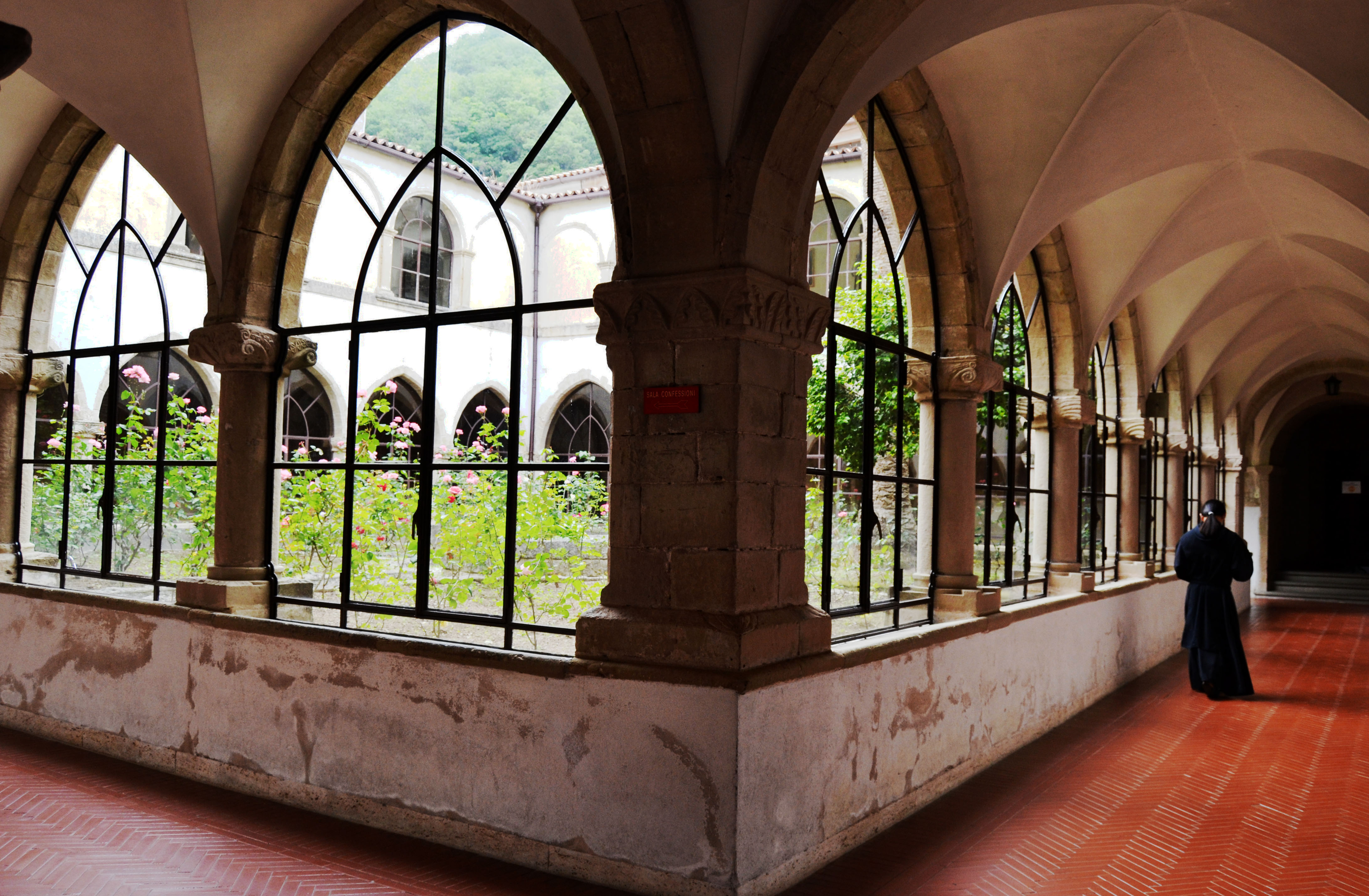 Cloître du sanctuaire Saint-François-de-Paule, à Paule (Calabre), Italie